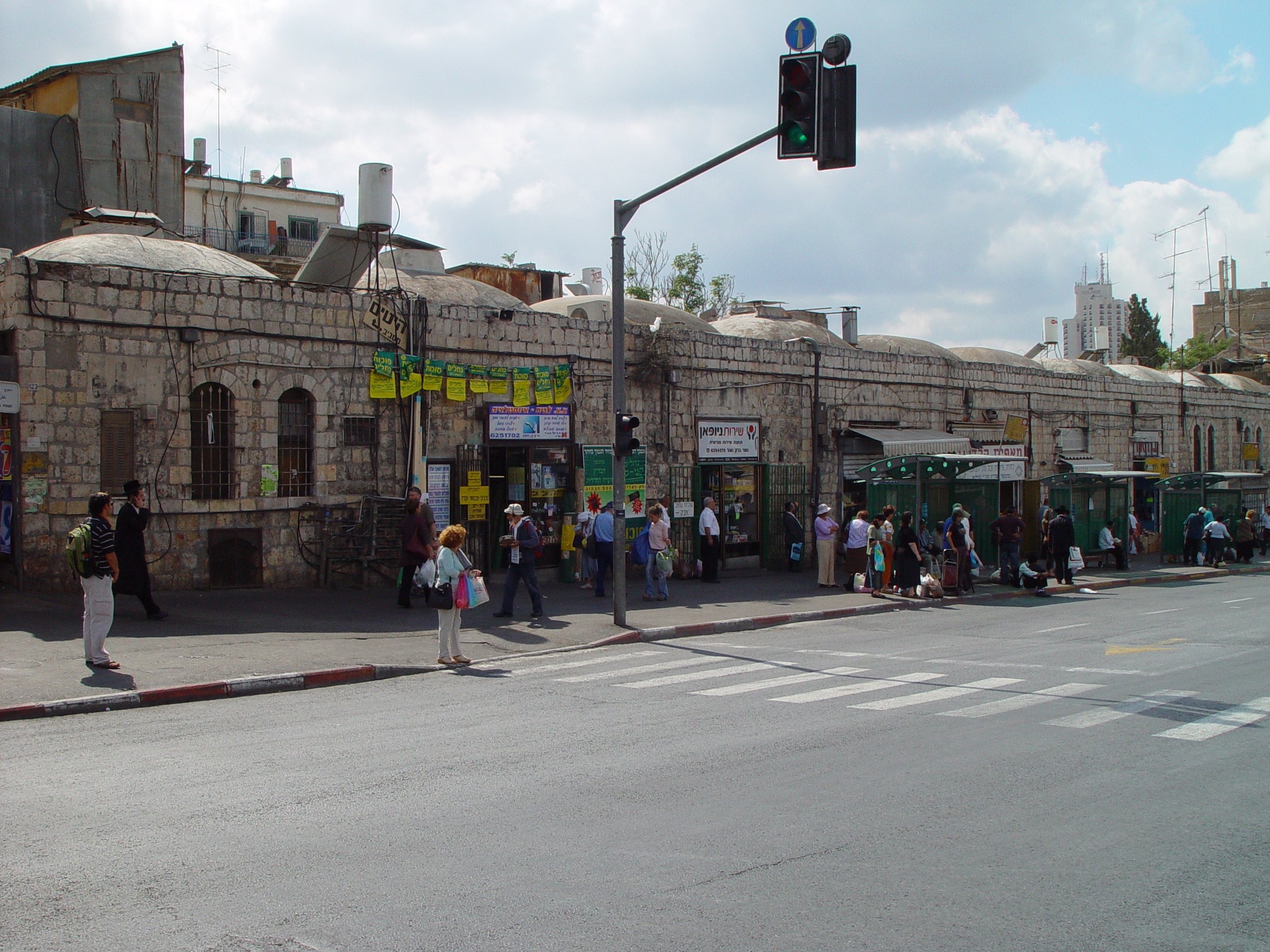 שכונת בית יעקב ירושלים, מבט מרחוב יפו